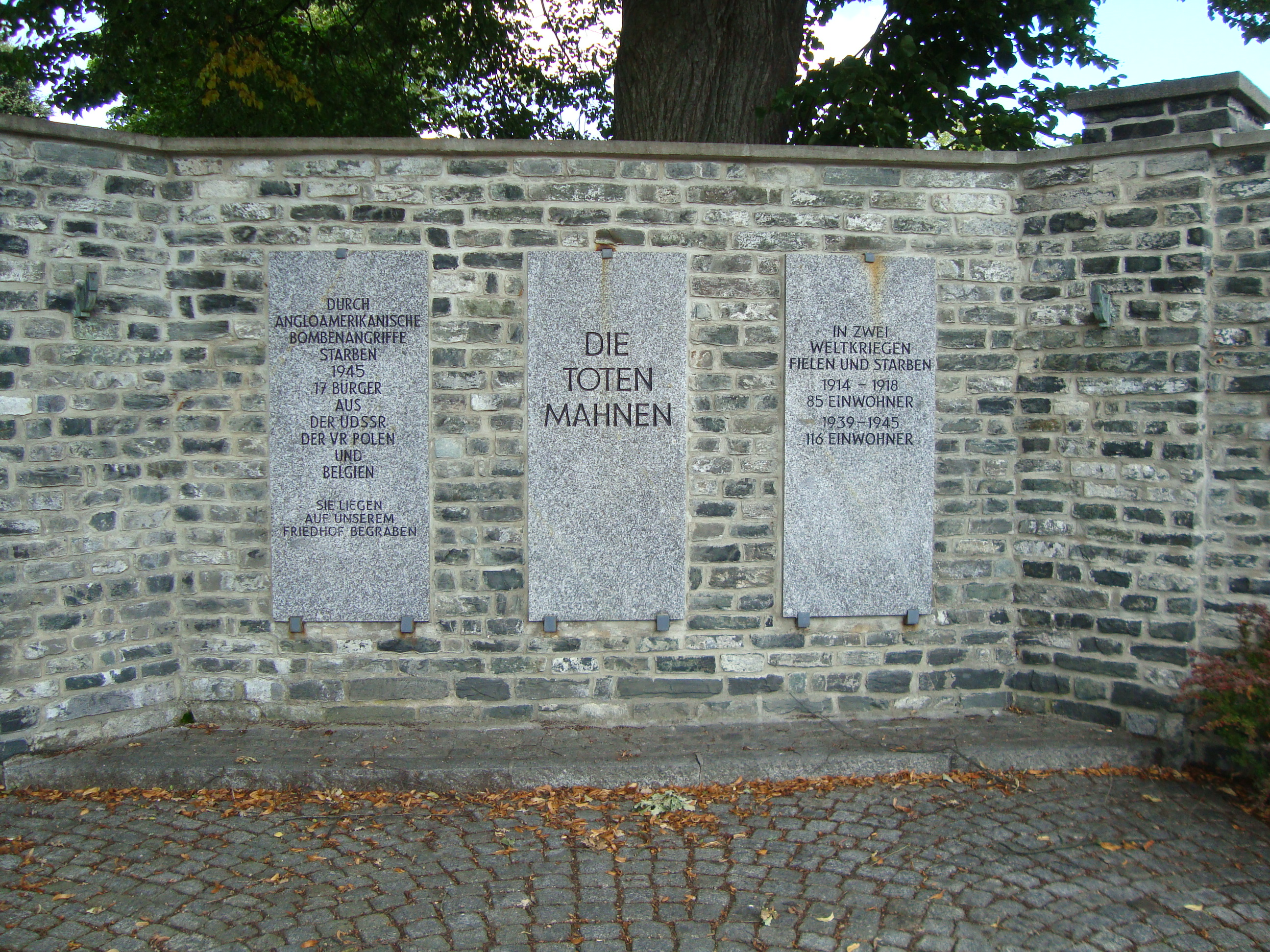 Gedenktafel für Kriegsopfer in der Friedhofsmauer von Amtsberg OT Weißbach im Erzgebirge